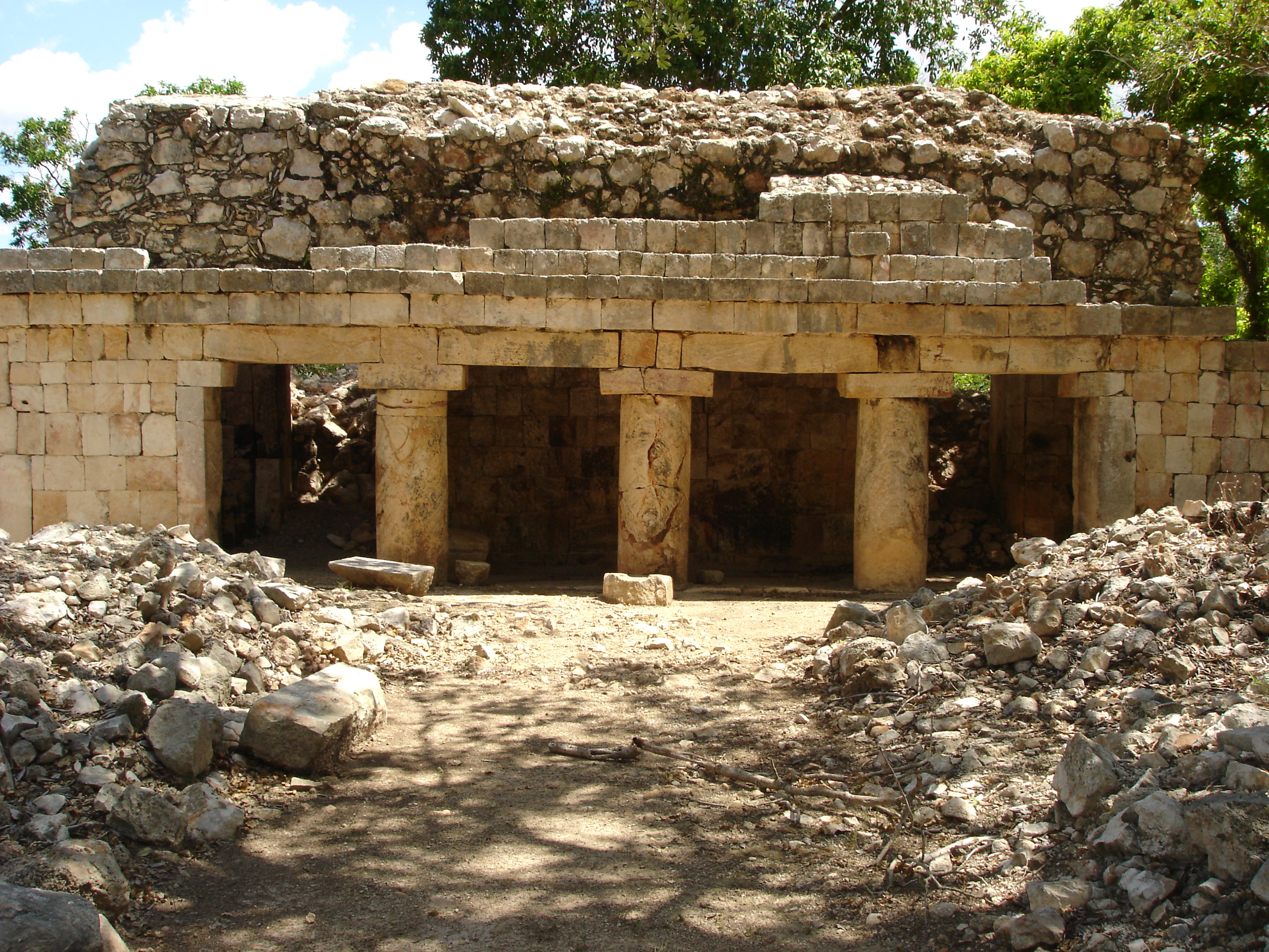 Xcalumkin